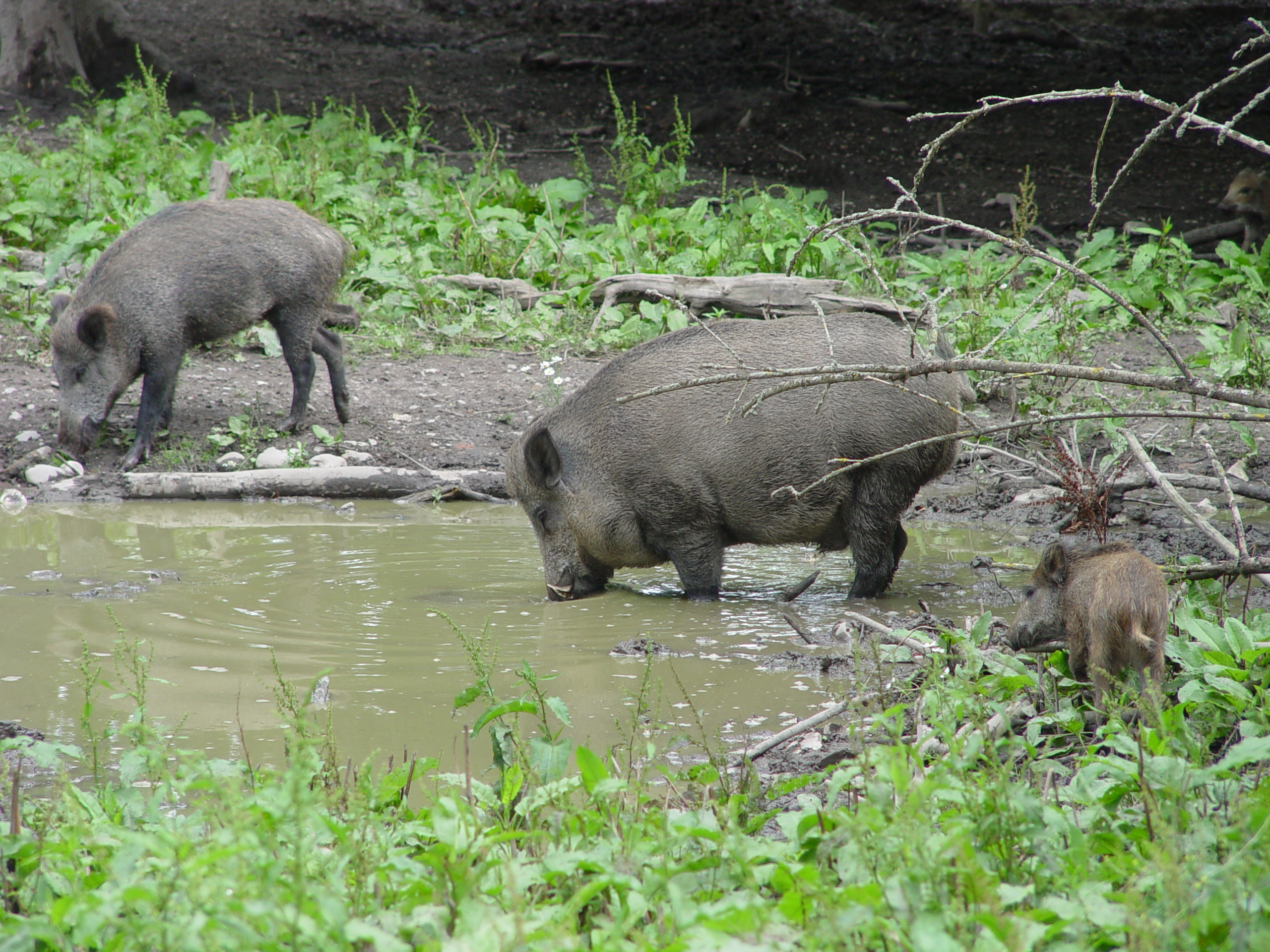 Wildschweine im Wildpark Josefslust bei Sigmaringen